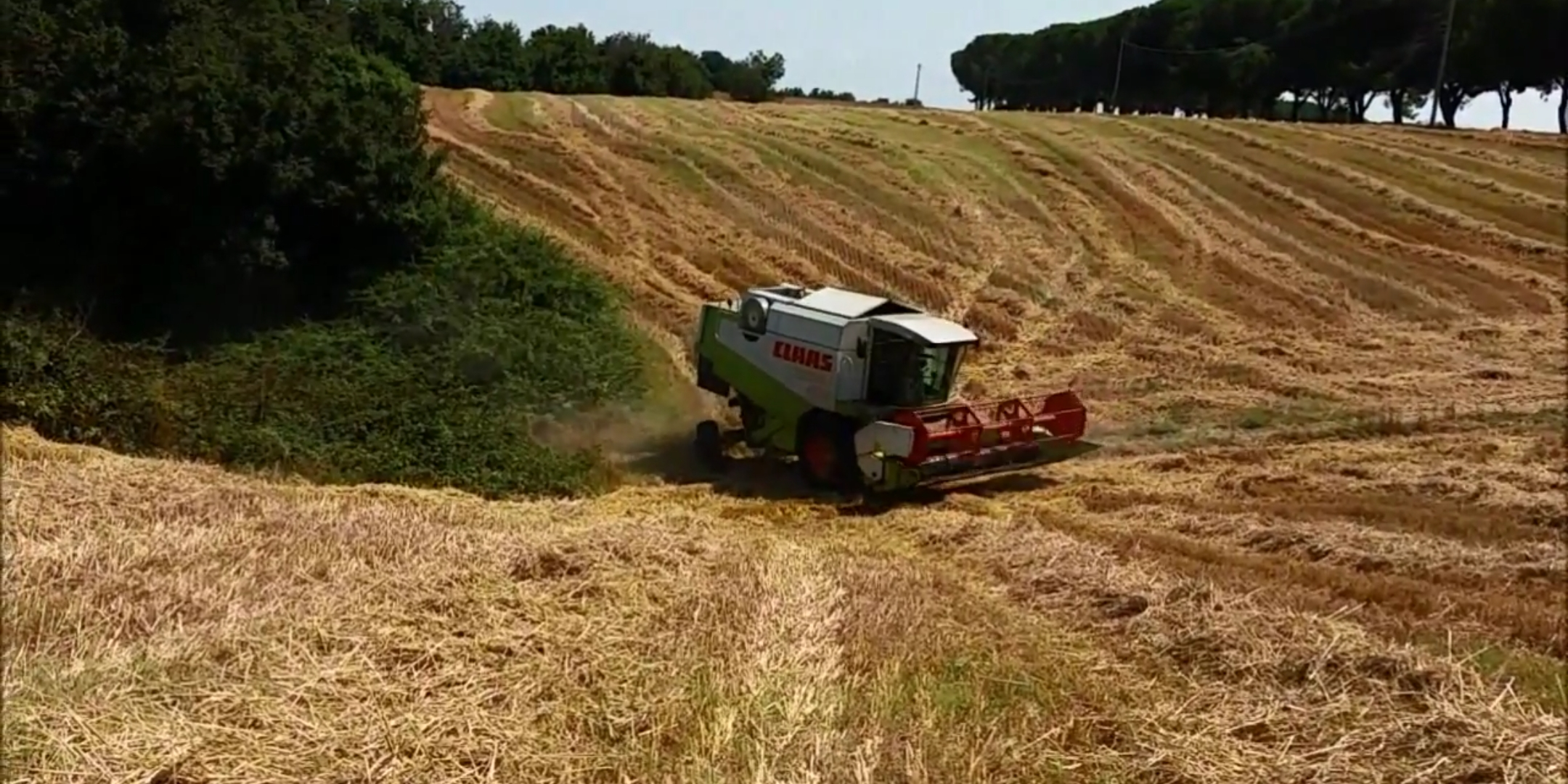 Work in the nature